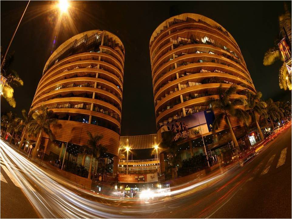 “CentroSanIgnacio”